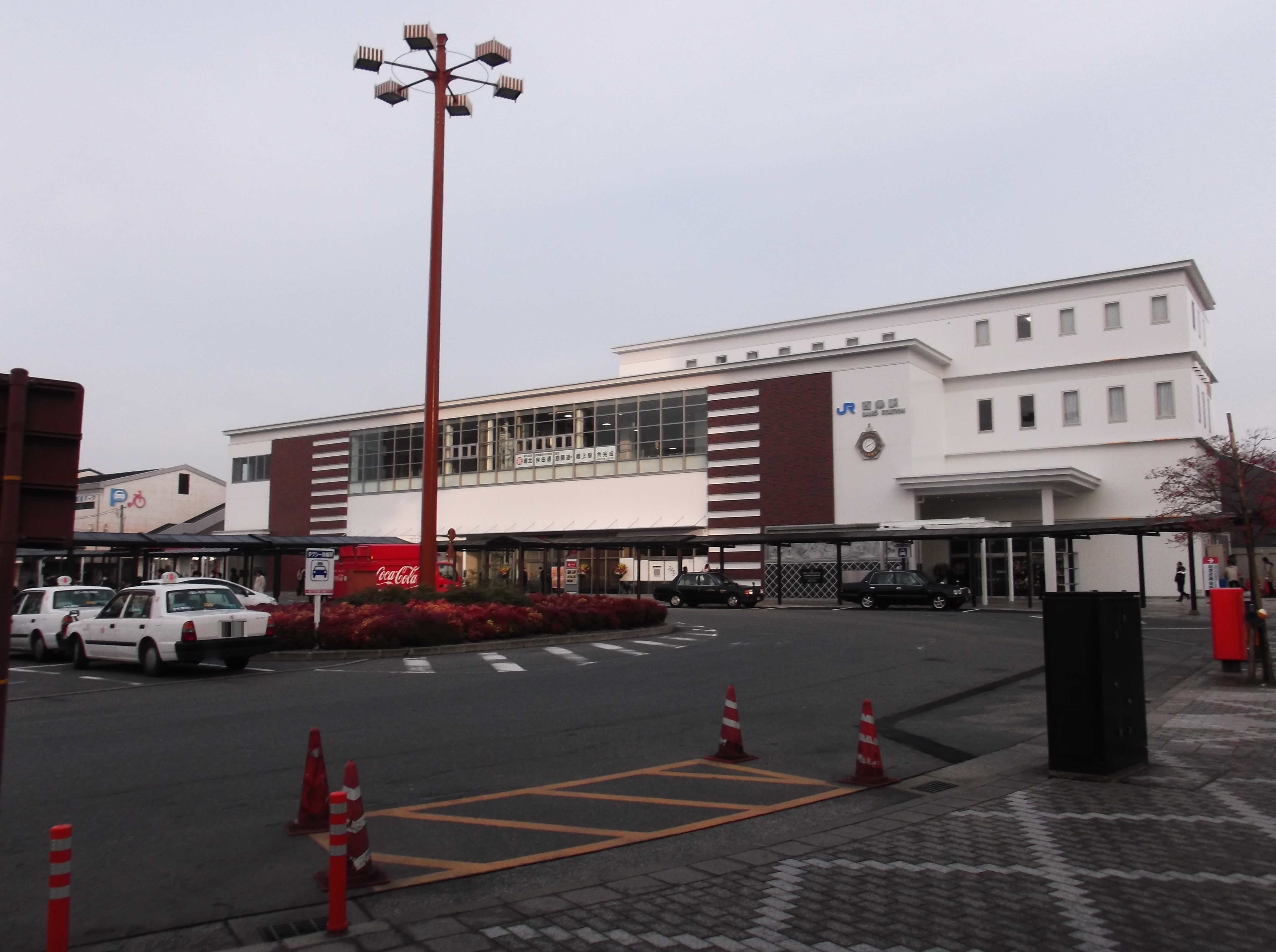 西条駅新駅舎全面供用開始時の画像